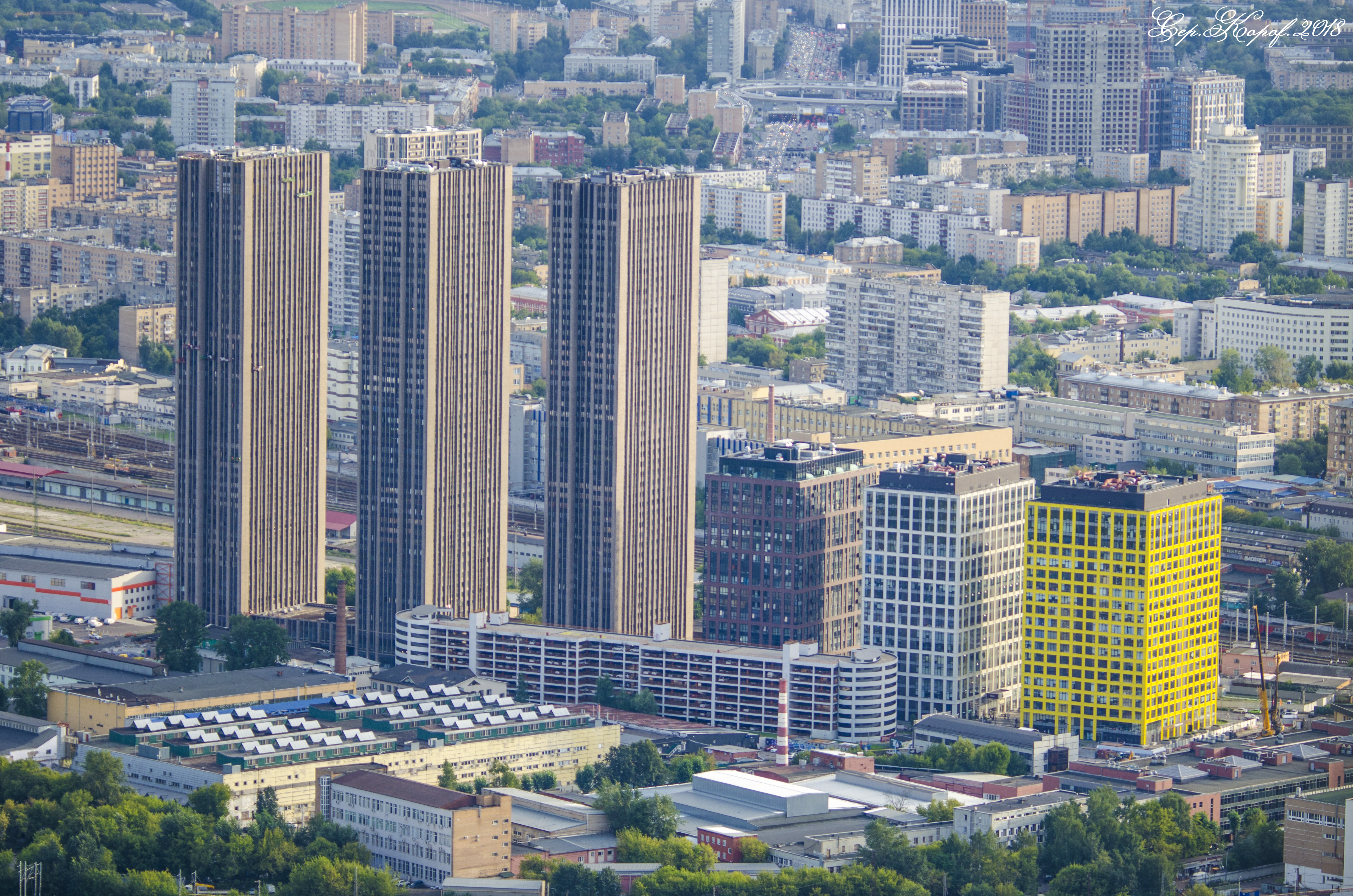 7небо : 7th heaven : Остались вопросы, ответы здесь